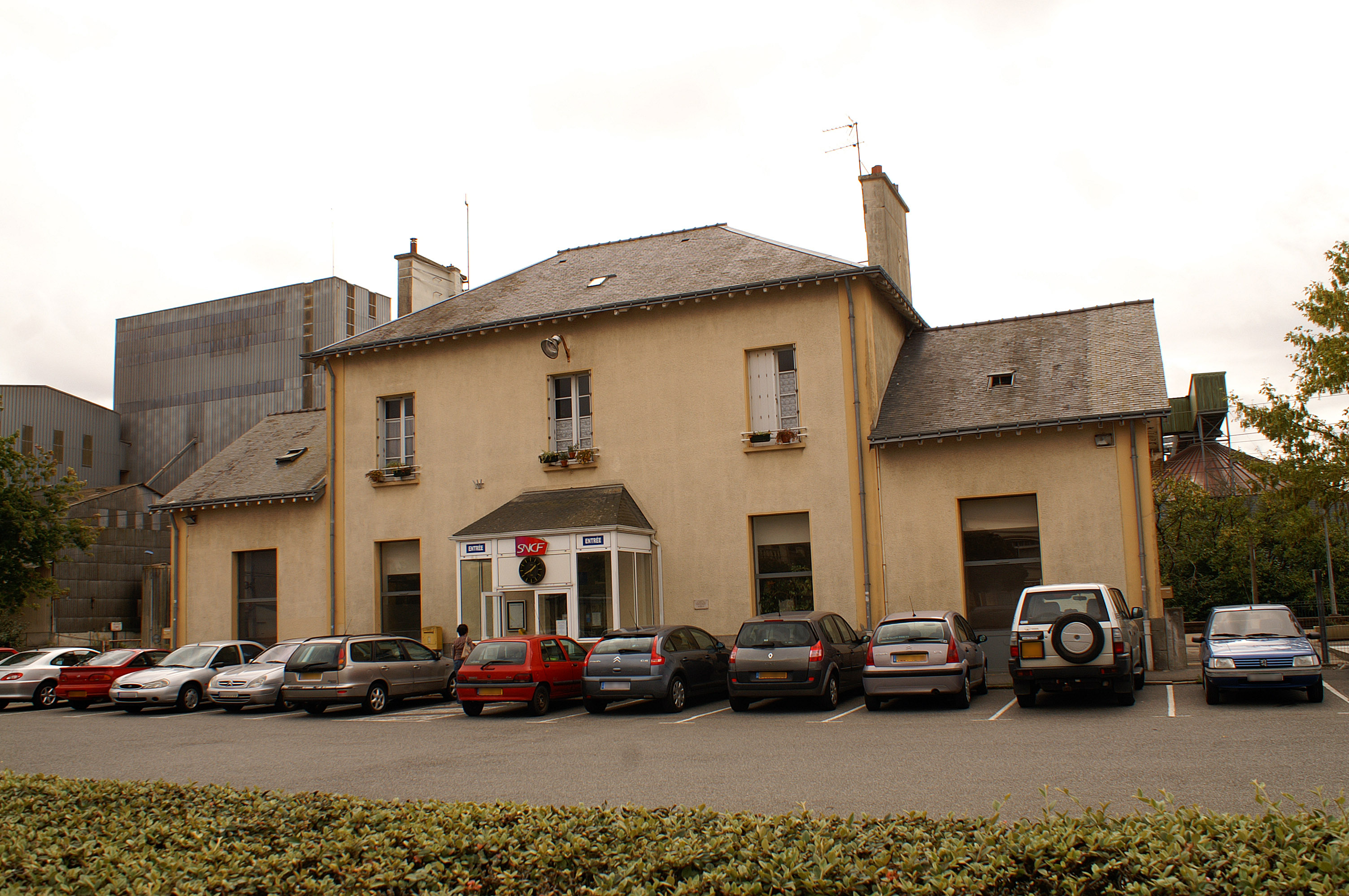 Façade extérieure de la gare d'Hennebont dans le Morbihan.